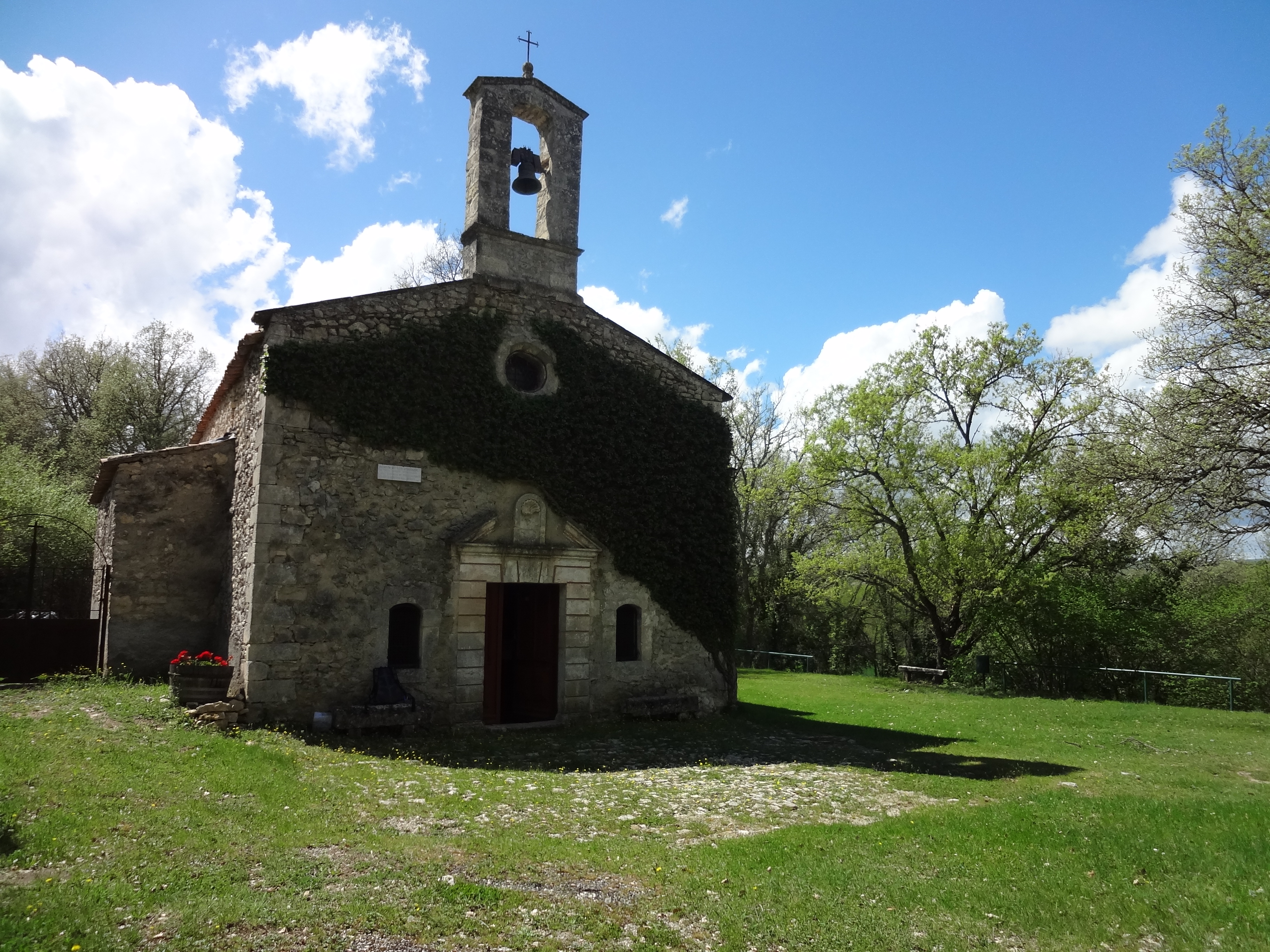 Façade de la chapelle Notre-Dame d’Hubage